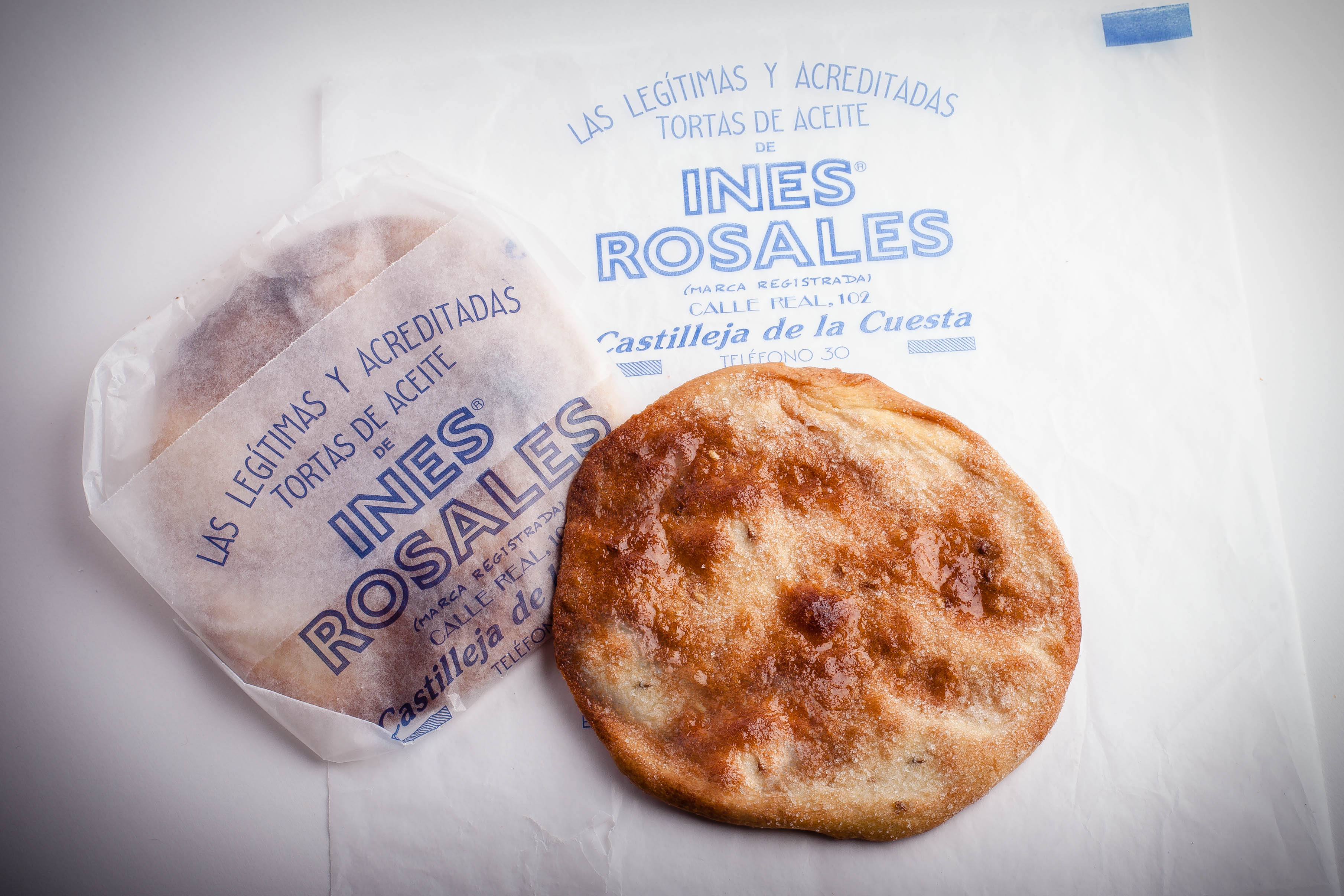 Las Tortas de Aceite de Castilleja de la Cuesta, Sevilla, están registradas bajo la denominación Especialidad Tradicional Garantizada (ETG), siendo Inés Rosales la única marca que se ajusta a esta normativa de la unión Europea.